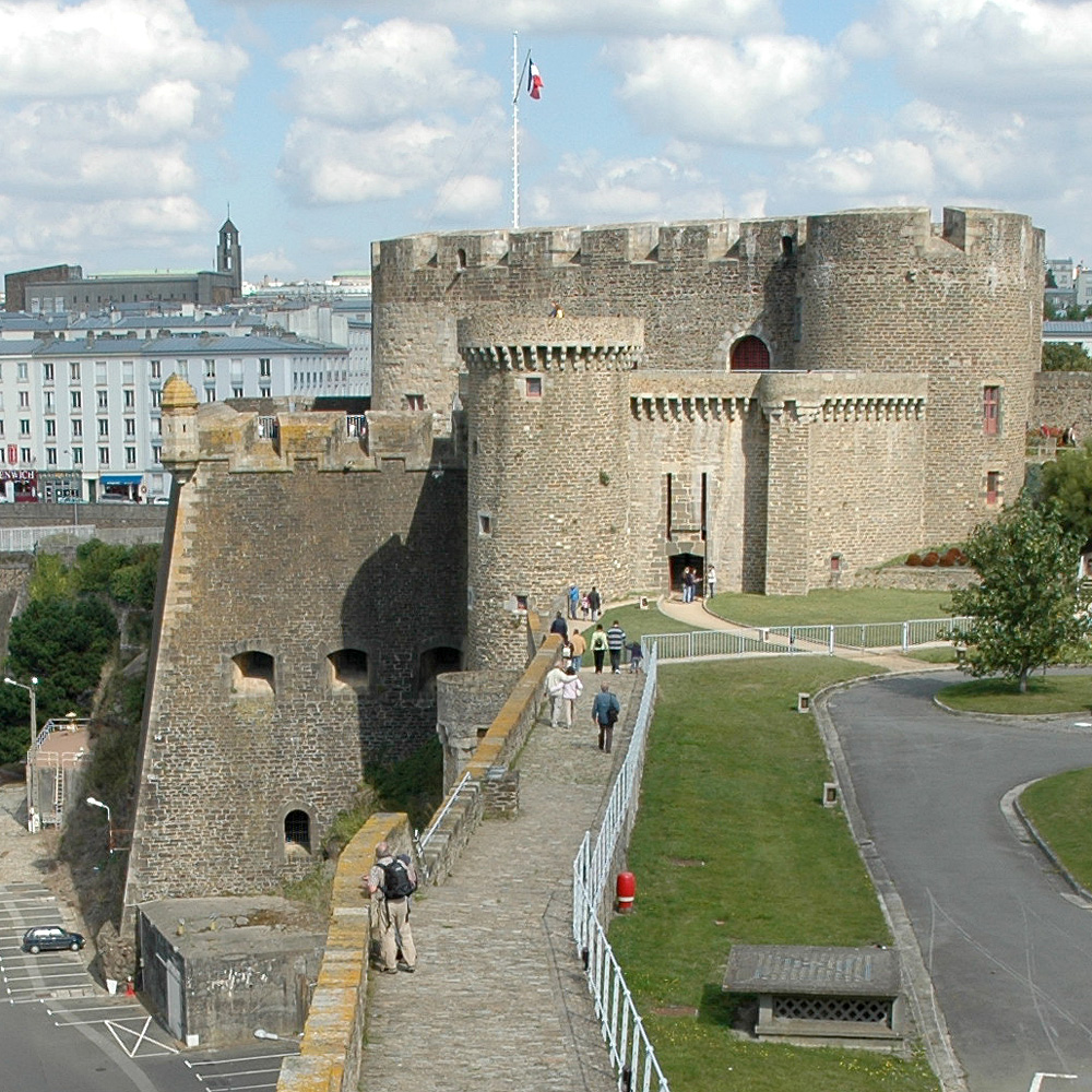 Le donjon du château de Brest, vue de la tour de Brest